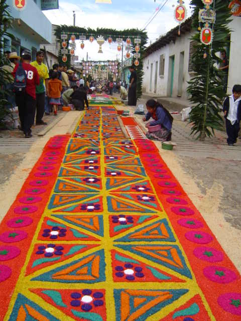 alfombras de corpus christi